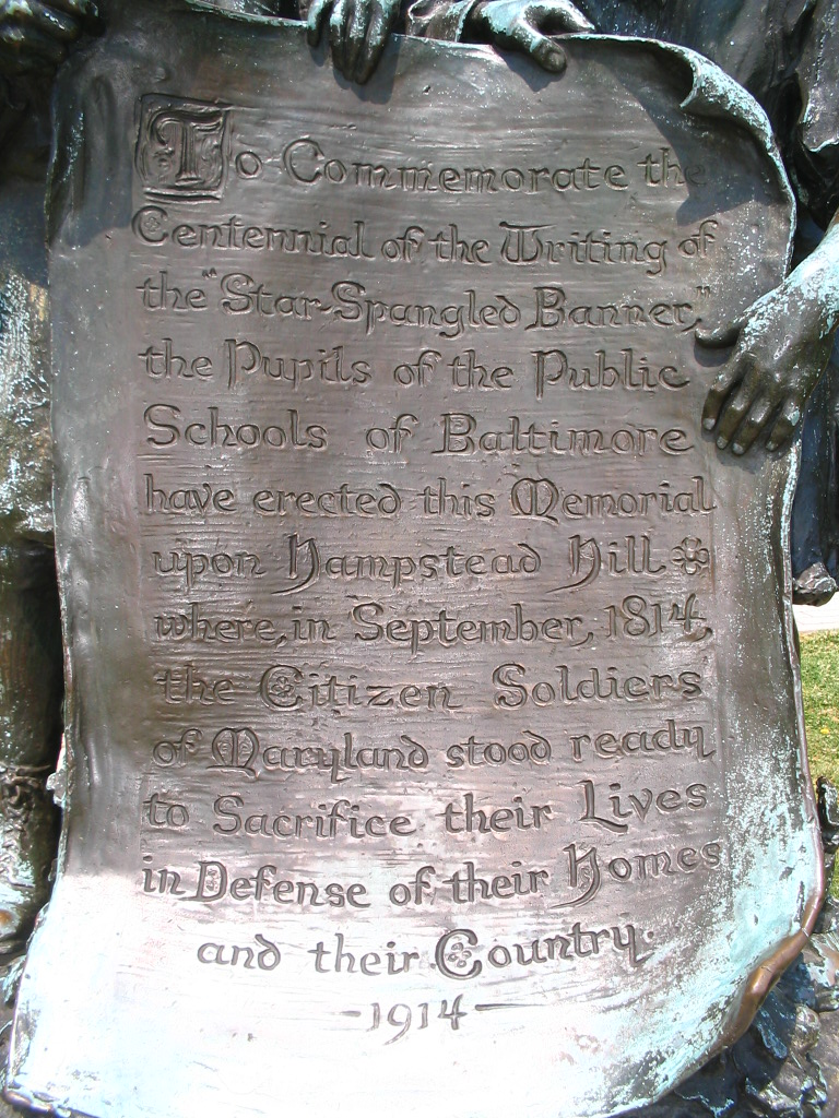 സ്റ്റാർ സ്പാങ്ഗിൾഡ് ബാനറിന്റെ ശതവാർഷികത്തിനായി ബാൾട്ടിമോറിലെ പാറ്റേഴ്സൺ പാർക്കിൽ സ്ഥാപിച്ച ഫലകം